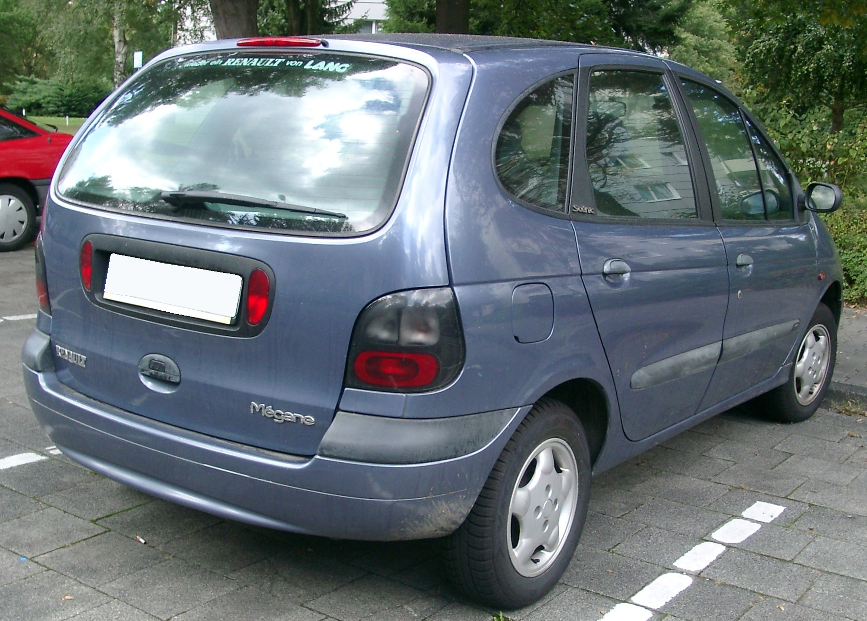 Renault Megane Scénic